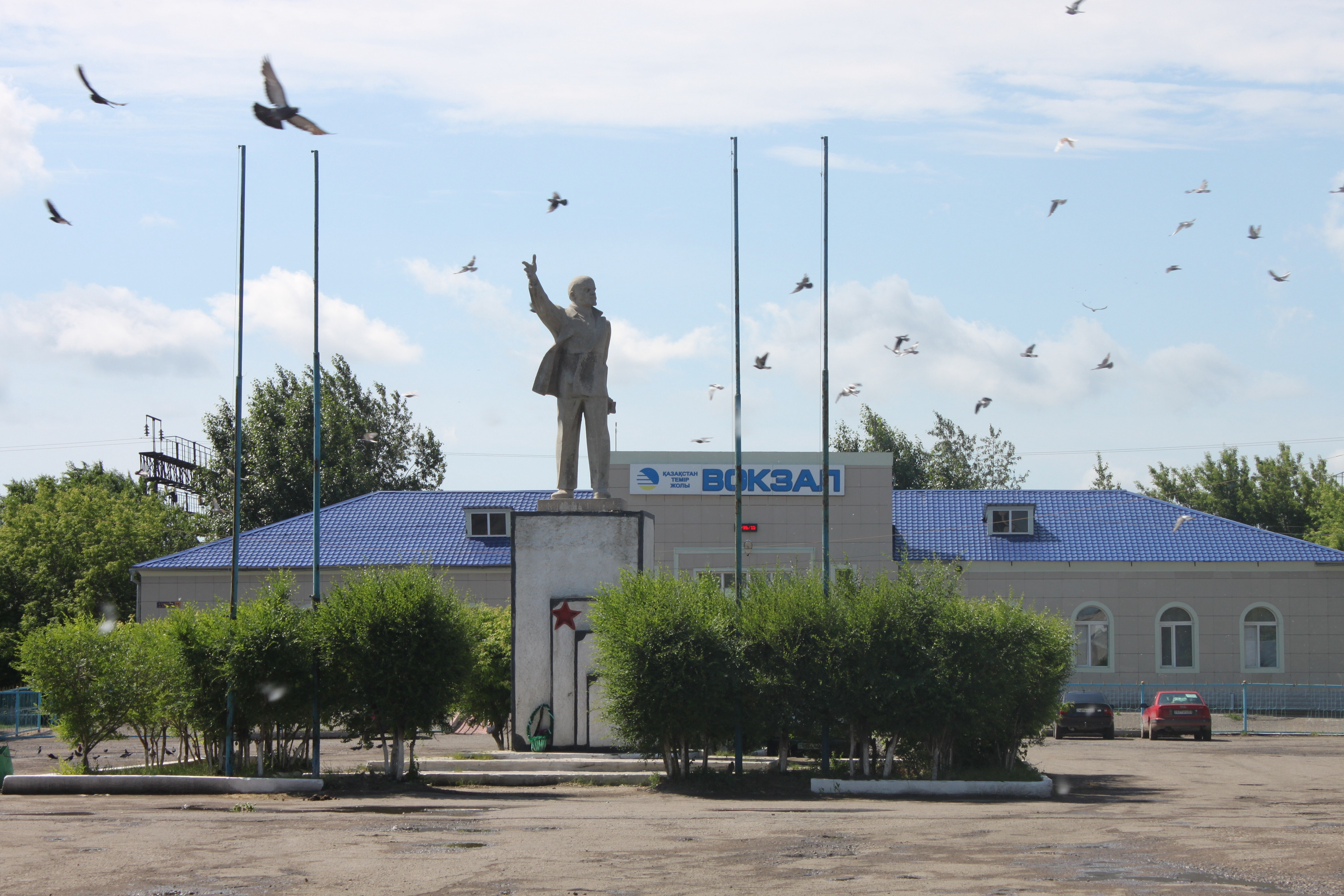 Esil